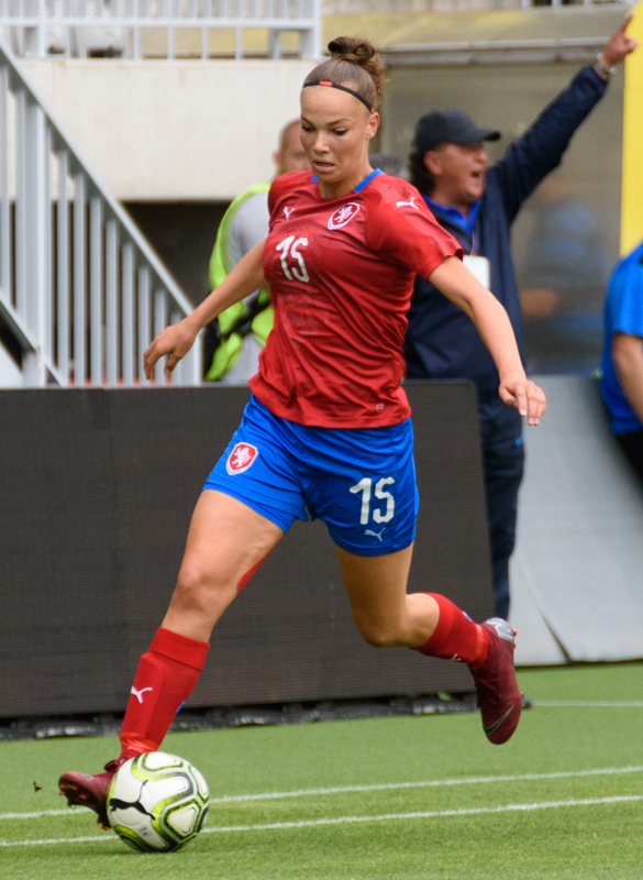 Andrea Stašková vs Slovenia